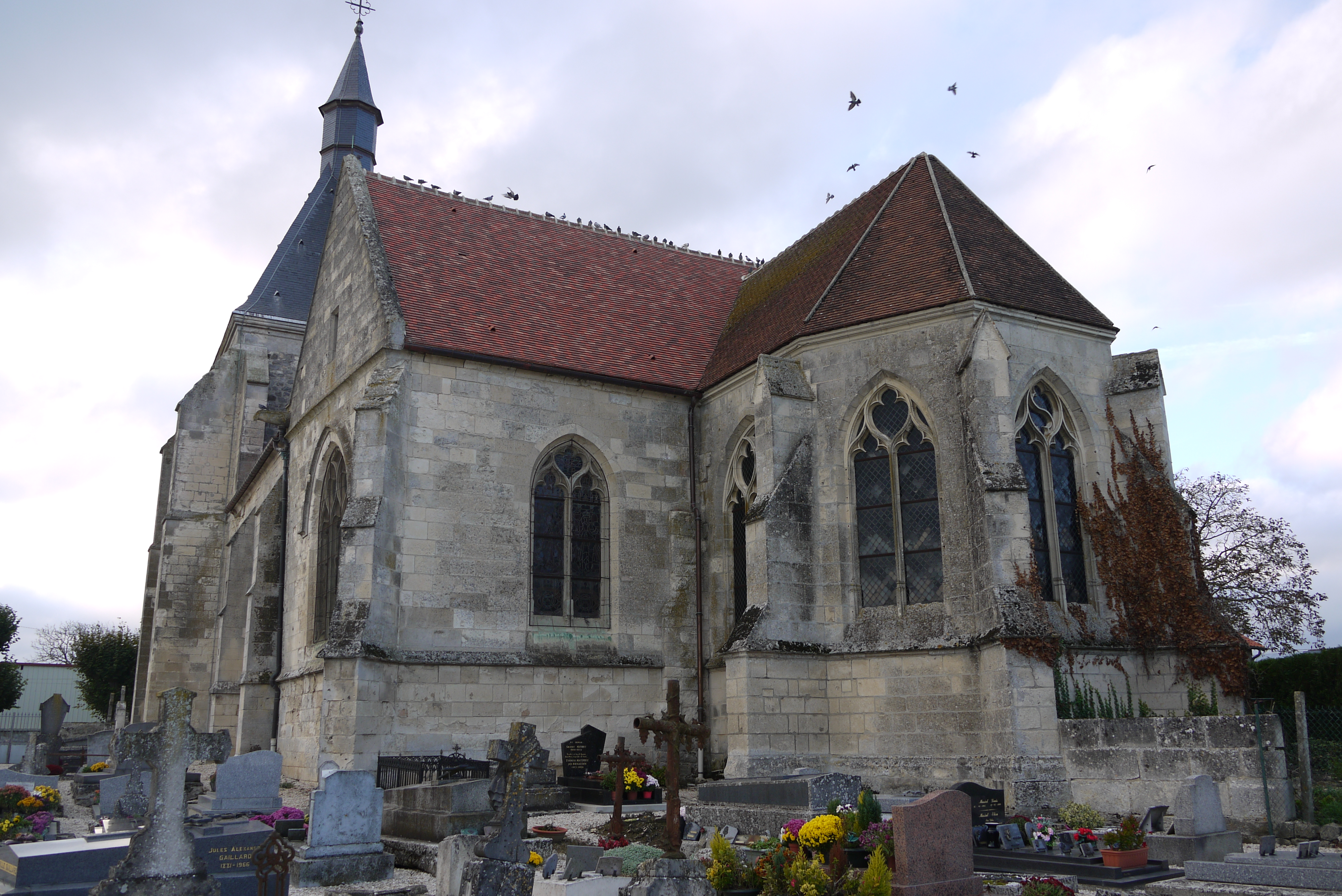 Église Saint-Martin du Grand-Rozoy